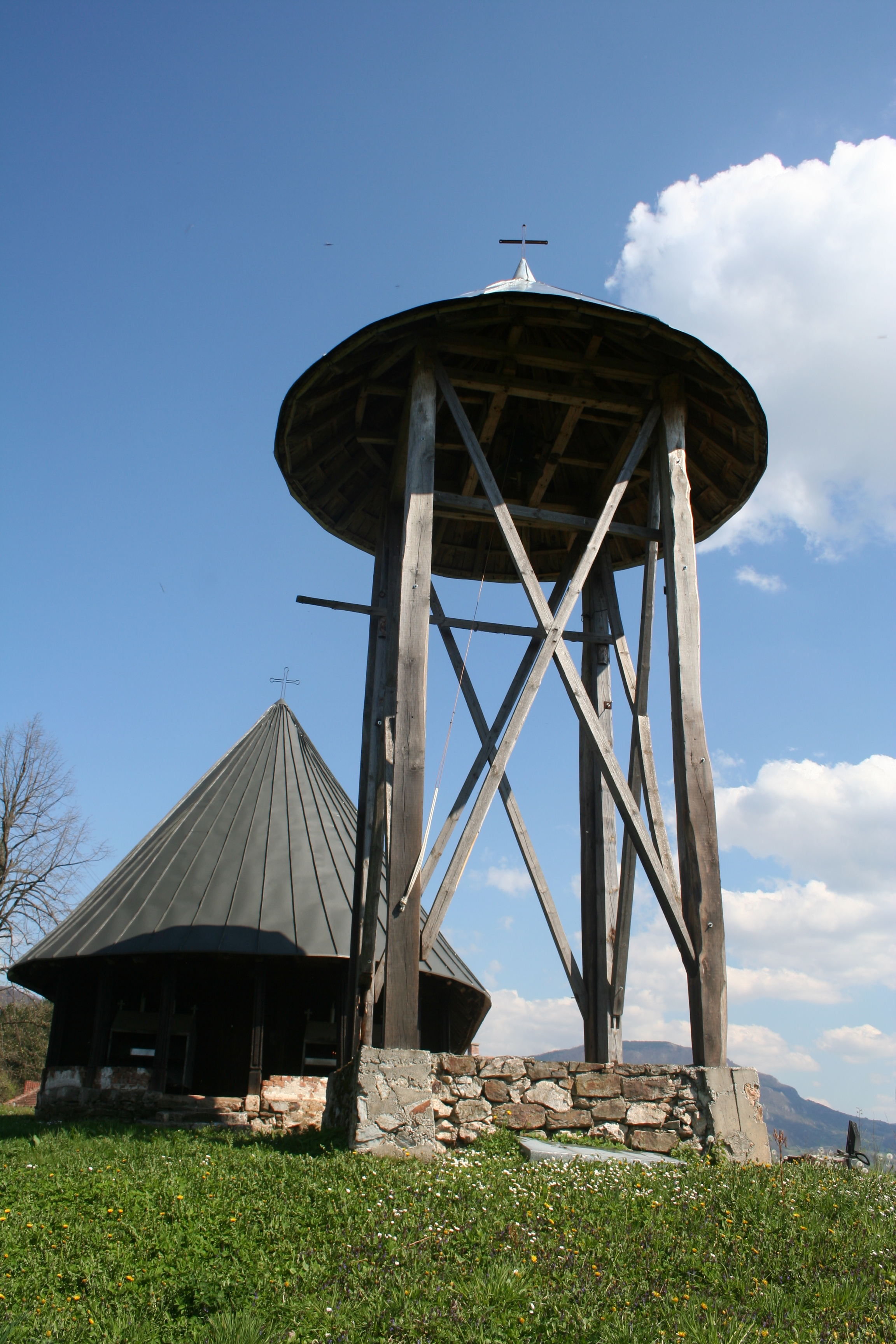 Crkva brvnara (Donja Orovica)